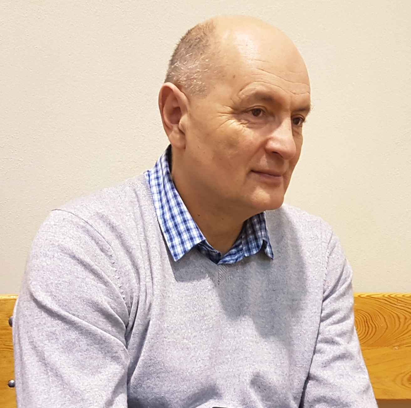 Tadeusz Gutowski